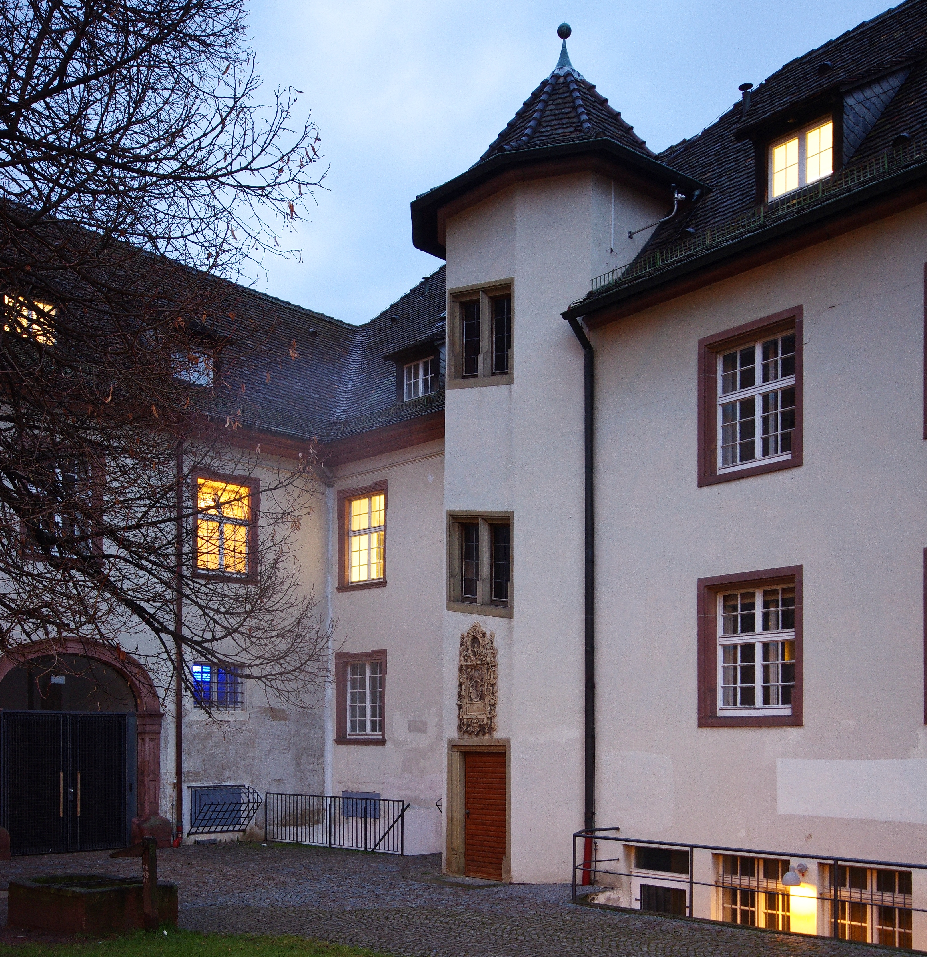 Der Innenhof des Peterhofs mit Wendeltreppenturm